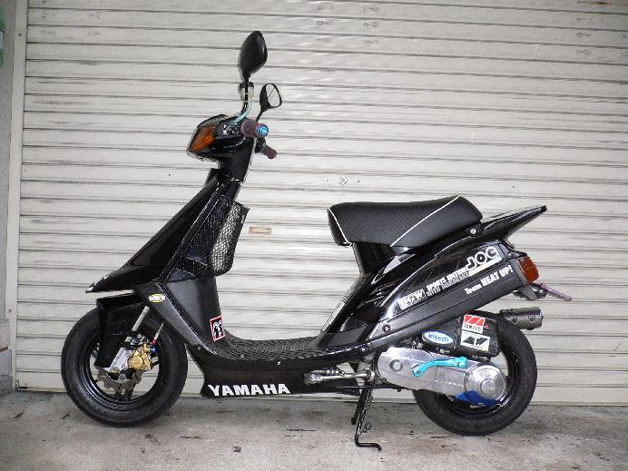 自己所有車を撮影したもの